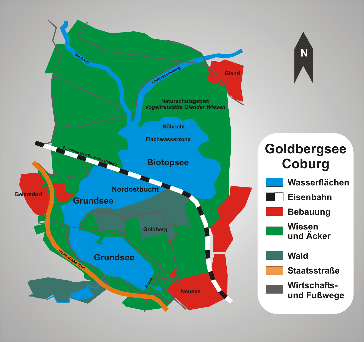 Karte zum Hochwasserrückhaltebecken Goldbergsee in Coburg (Fertigstellung 2008); im oberen Kartenteil (nödlich der Bahnstrecke) das Naturschutzgebiet „Vogelfreistätte Glender Wiesen“